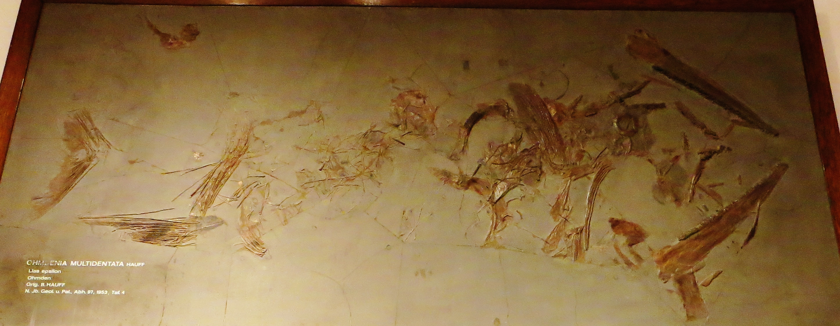 Fossil of Ohmdenia, an extinct fish- Took the picture at Museum of Paleontology, Tubingen